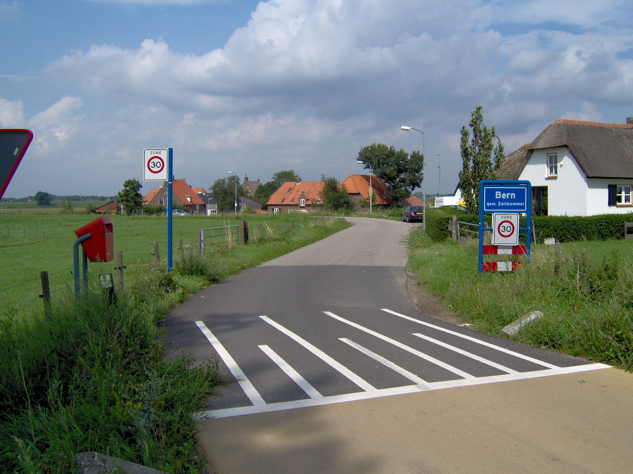 eigen foto